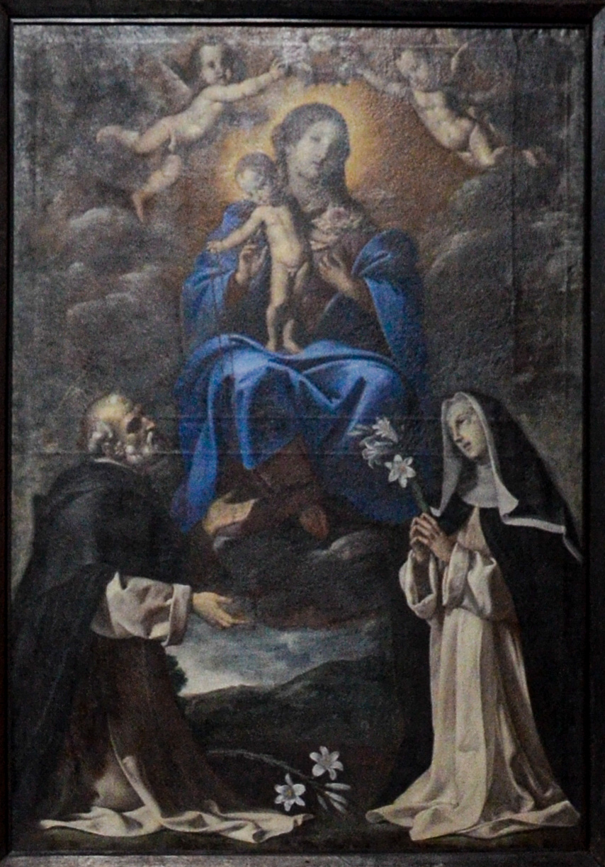 Madonna del Rosario tra san Domenico di Guzmán e santa Caterina da Siena, attribuito al pittore Francesco Torriani - Chiesa parrocchiale di San Michele Arcangelo di Brusino Arsizio